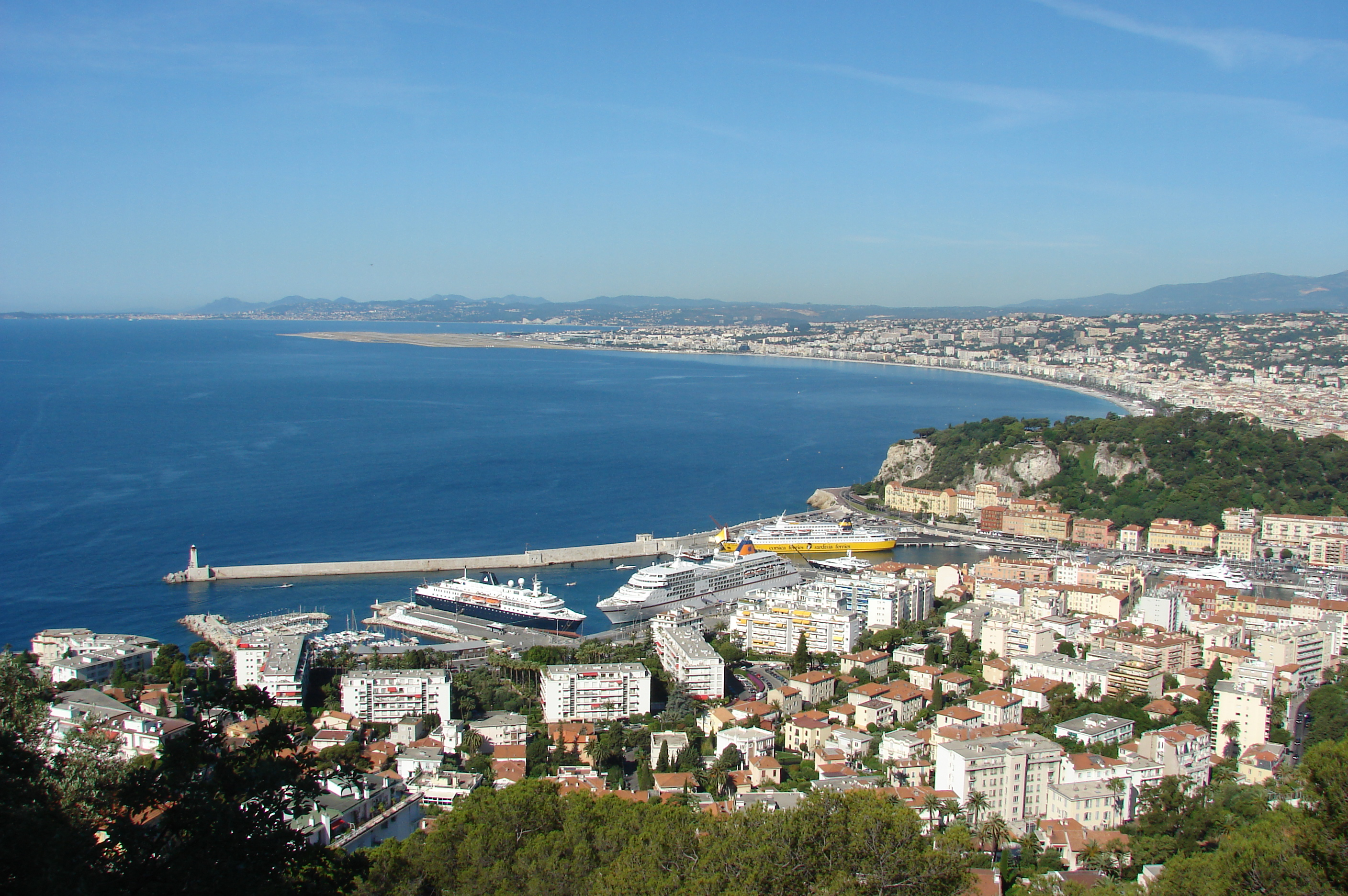 Nice